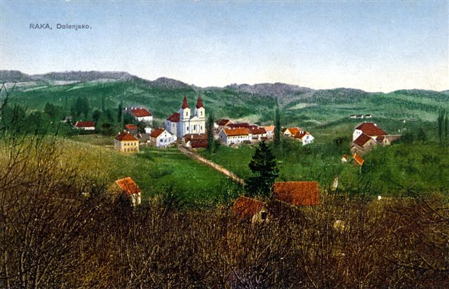 Grad Raka